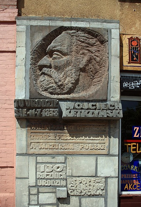 Giżycko - miasto w woj. warmińsko-mazurskim